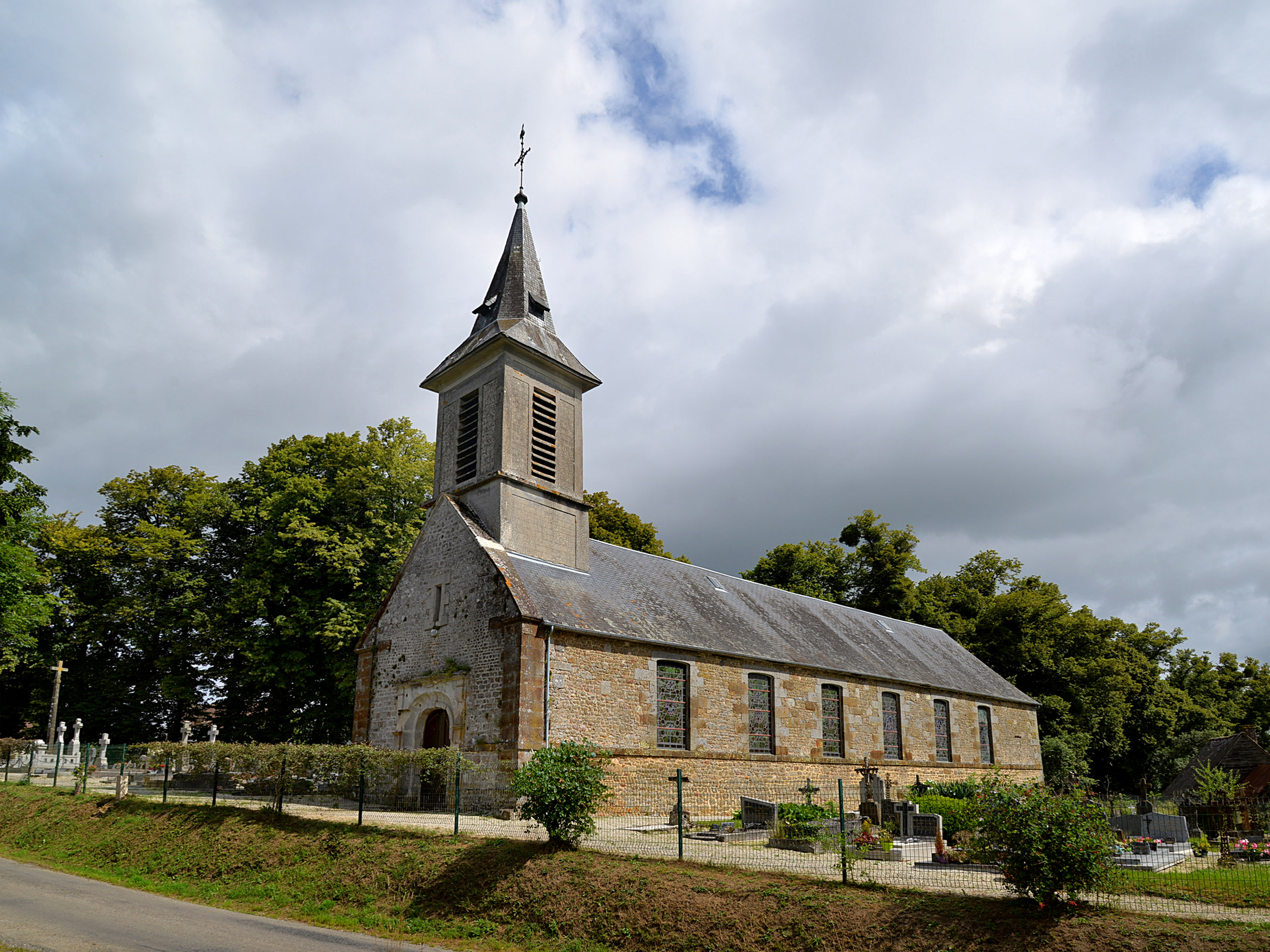 Lignou (Orne)